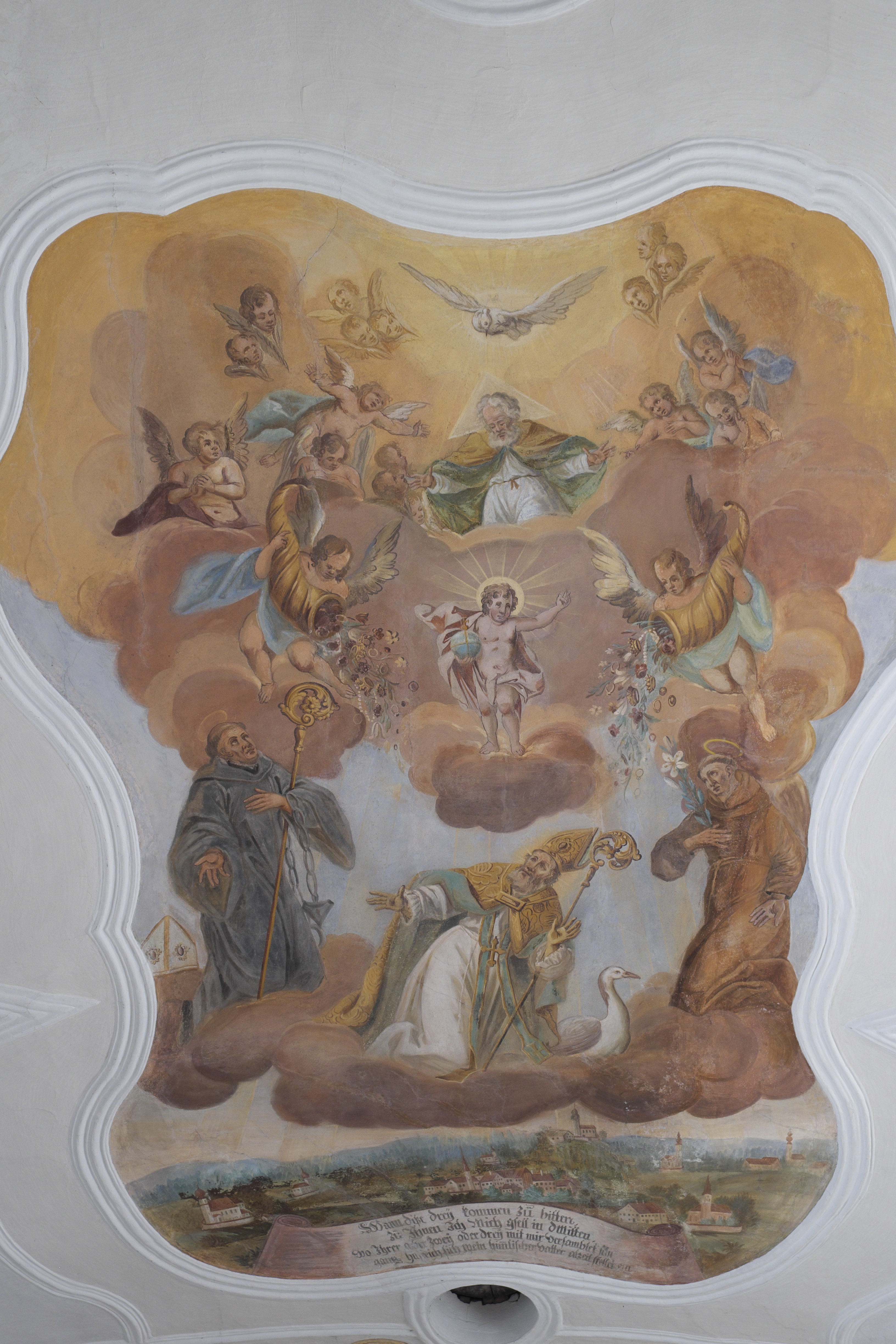 Katholische Filialkirche St. Martin in Niederstraubing (Steinkirchen) im Landkreis Erding (Bayern/Deutschland), Deckenmalerei im Langhaus von Franz Joseph Aiglsdorfer, von 1754